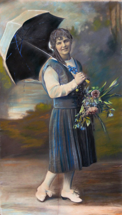 Retrato de Ida Sartori Paternoster, casada com Antônio Frantz, foto-pintura